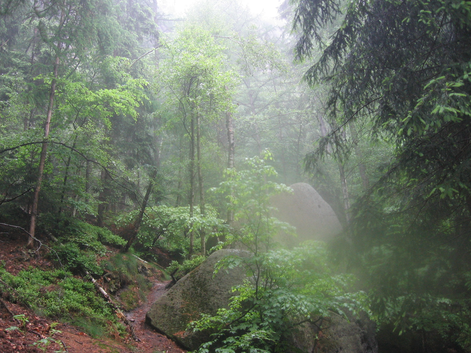 Mystischer Wald am Morgen